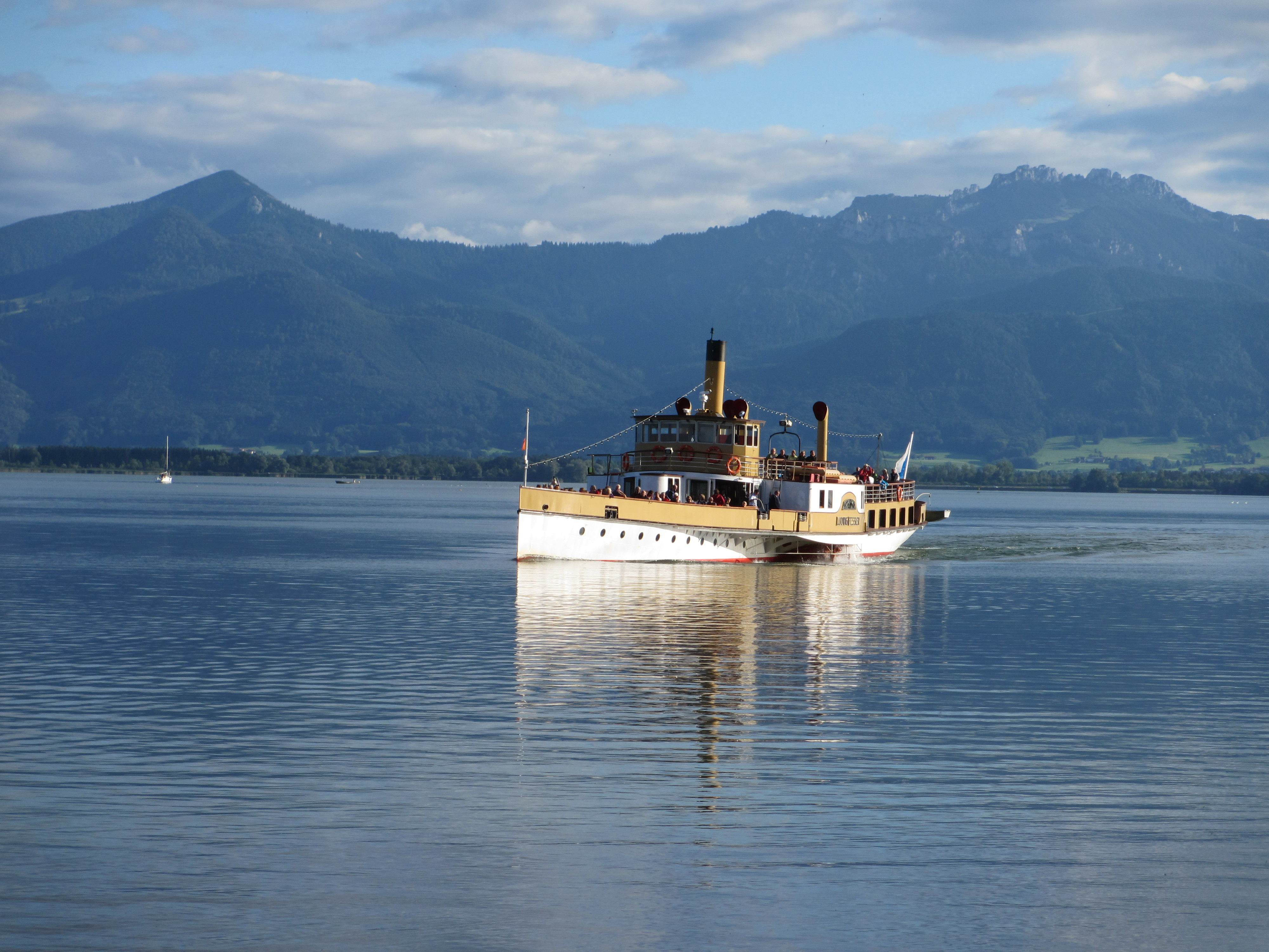 Schiff Ludwig Fessler, Chiemsee